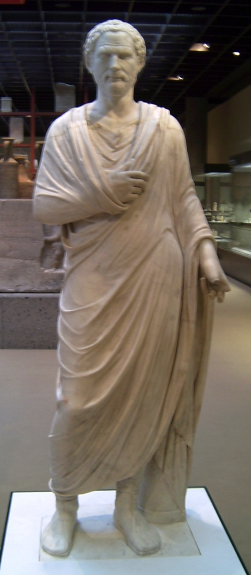 Römische Statue einer Privatperson, die vor 1818 zu Demosthenes umgestaltet wurde; Römisch-Germanischen Museum